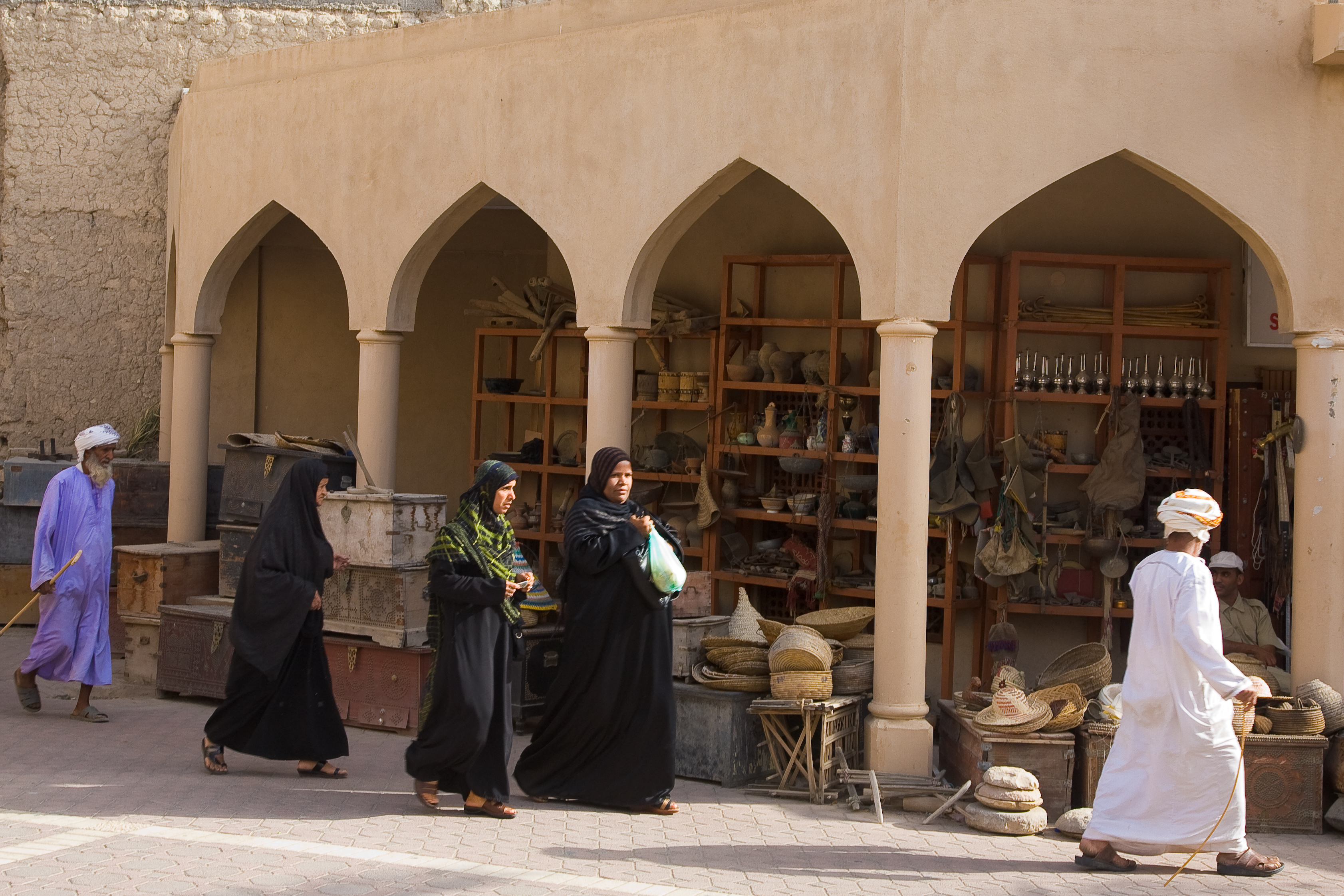 Nizwa souk